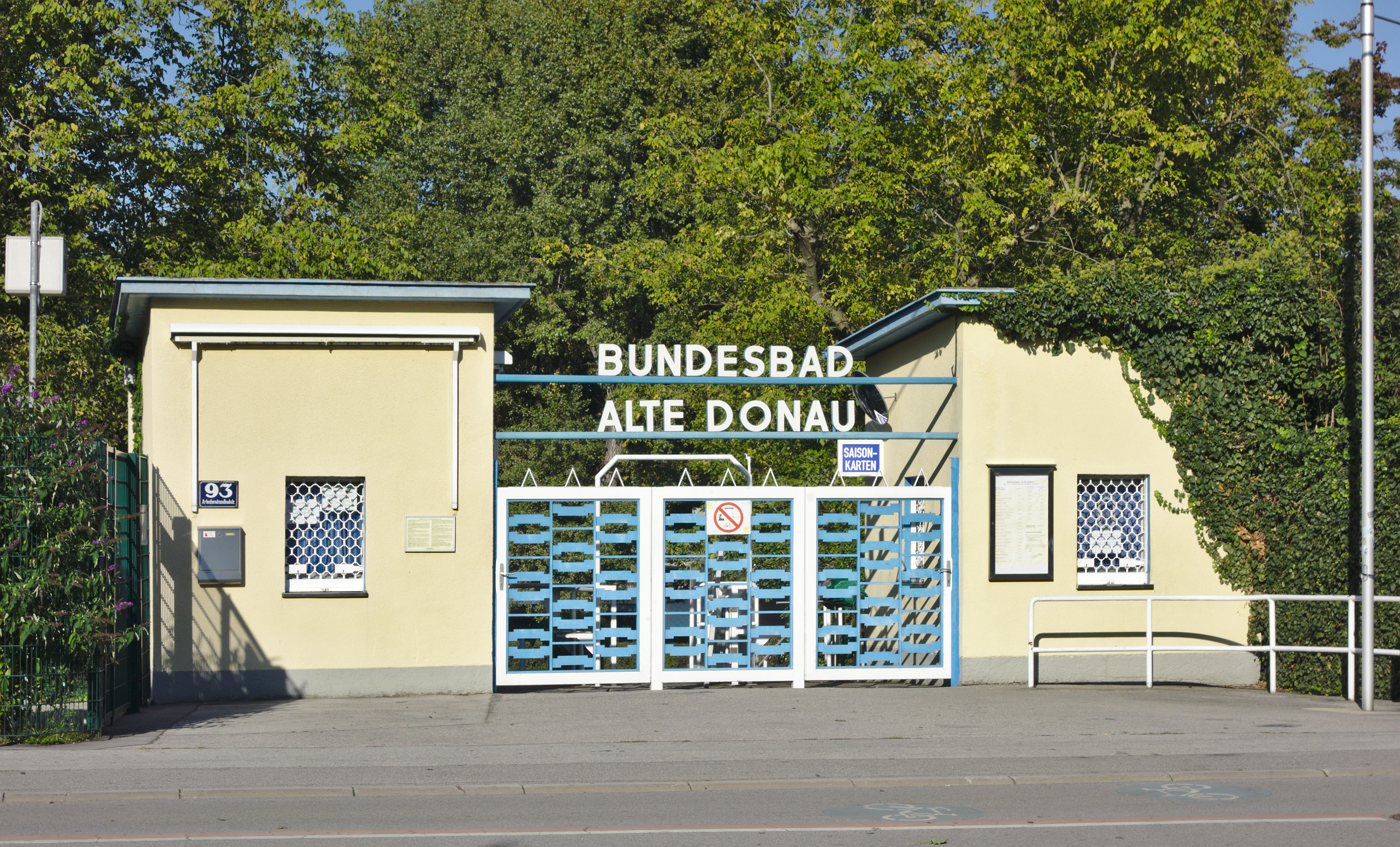 Bundessportbad Alte Donau